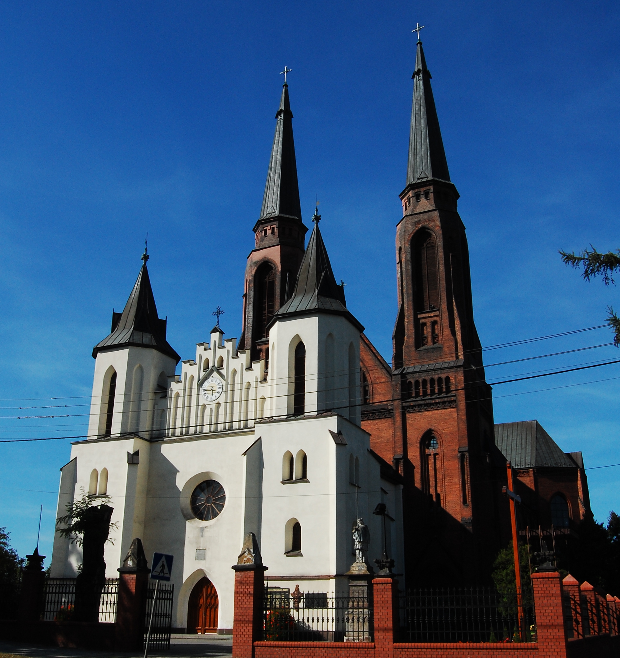 Kościół parafialny p.w. Św. Joachima (A/166/06 z 11 I 2006)